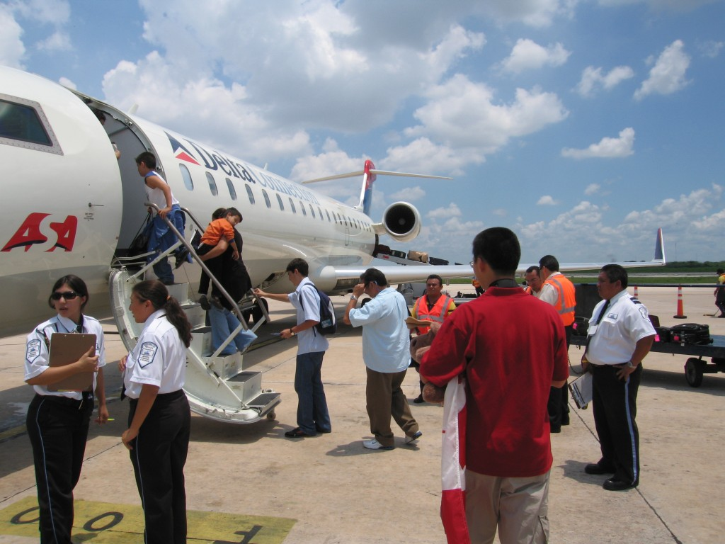 In Mérida, Mexico. IMG_6419